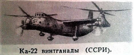 Vintqanad